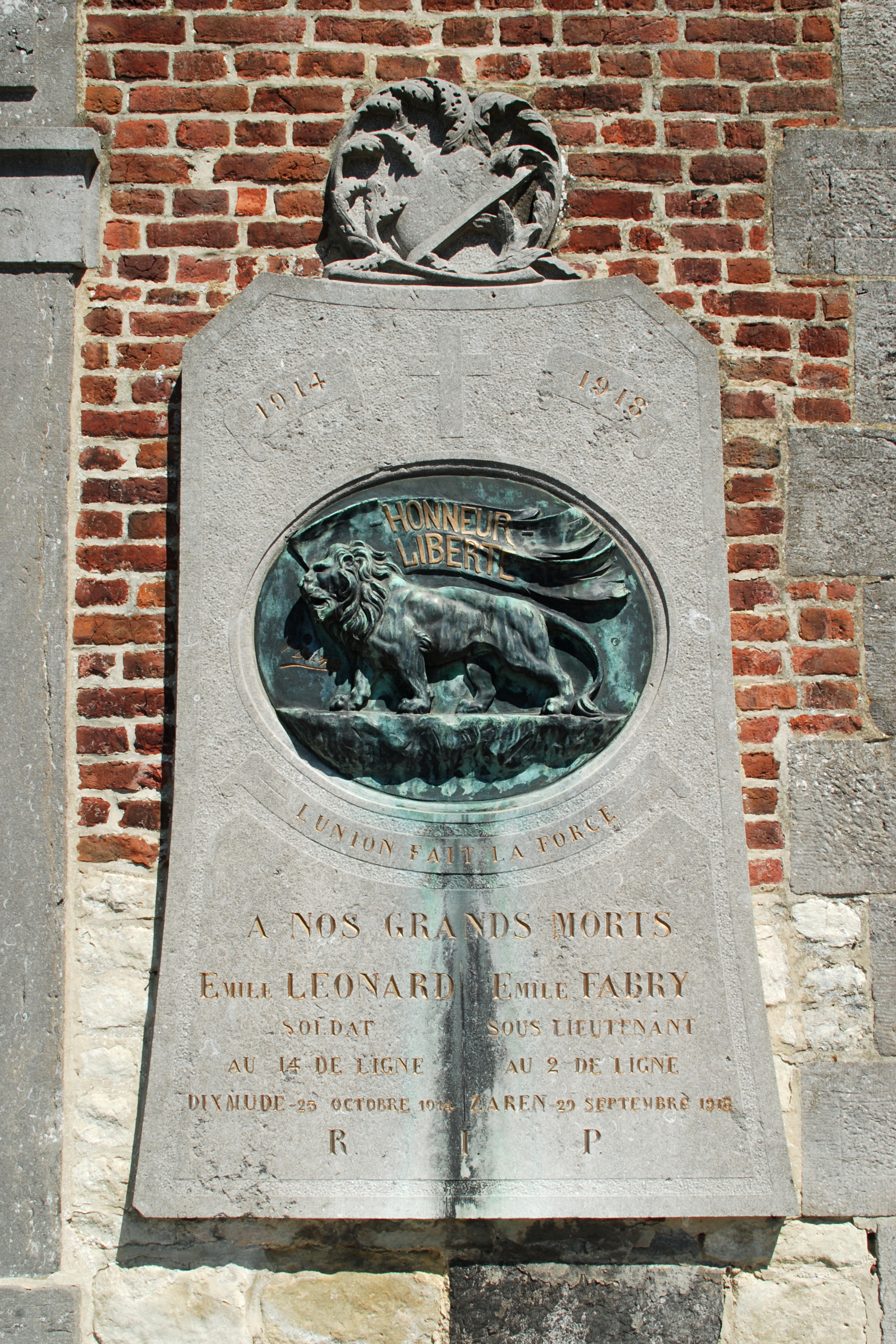 Belgique - Brabant wallon - Mont-Saint-Guibert - Église Saint-Pierre de Corbais